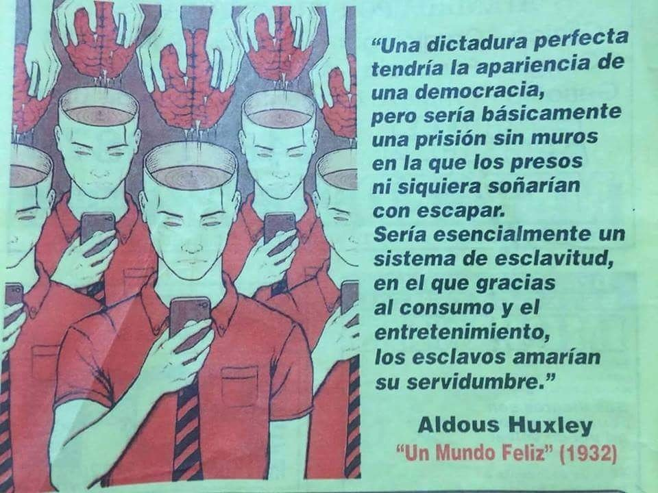 Es una imagen que ayuda al lector a identificar el contexto del artículo, así como entender de mejor manera su contenido, cumple una función didáctica y estética dado que hay mucho texto y pocas imágenes.